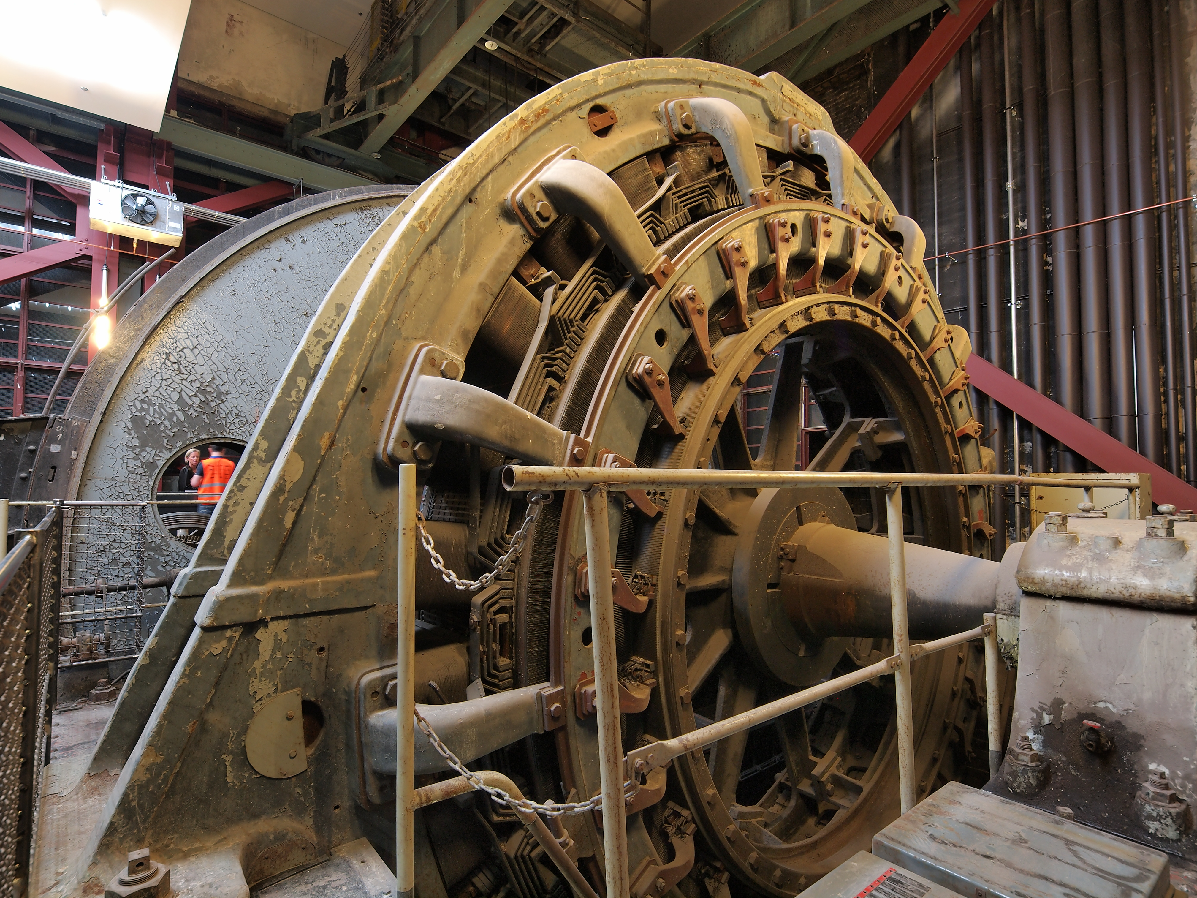 Turm-Fördermaschine Schacht 2, vorn der Elektromotor, dahinter die Treibscheibe